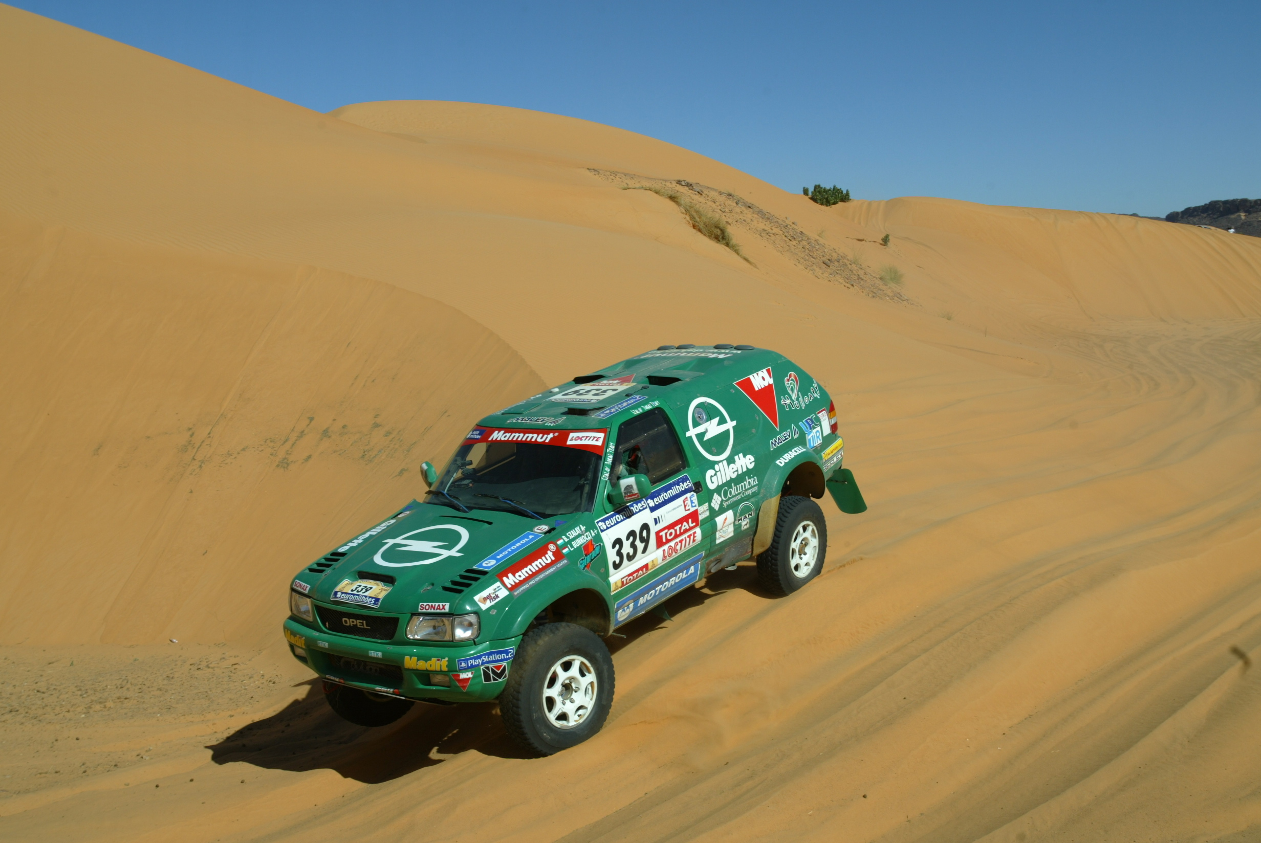 2004-2006 Opel Frontera